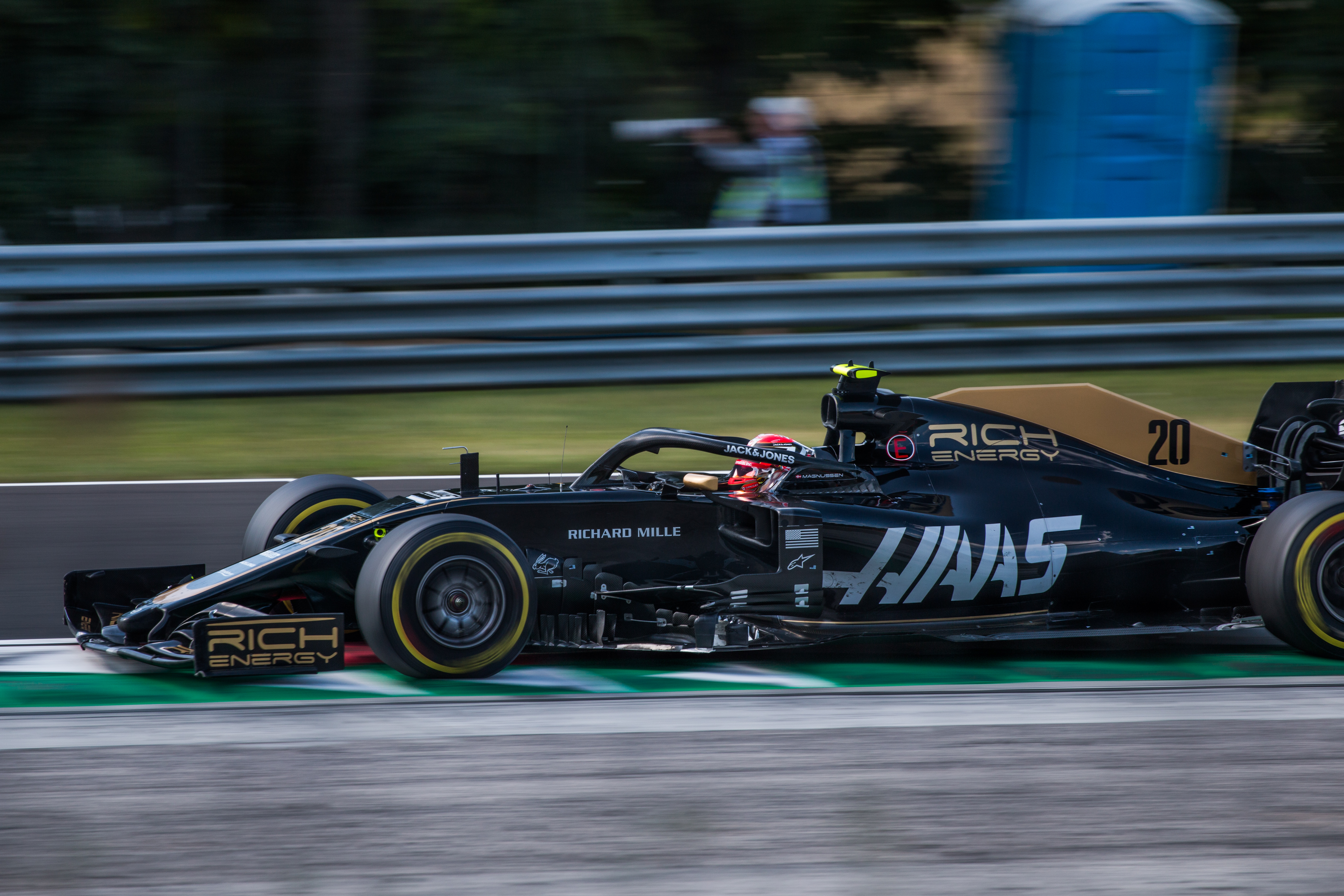 Kevin Magnussen in his Haas VF-19 during Formula 1 Hungarian Grand Prix 2019 on the Hungaroring